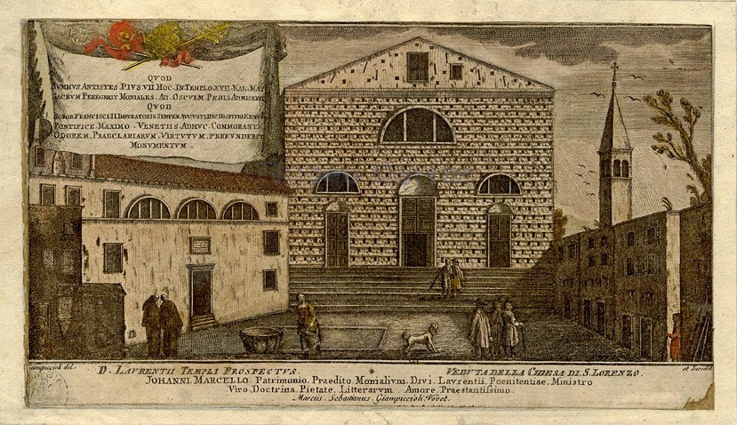 Veduta della chiesa di San Lorenzo